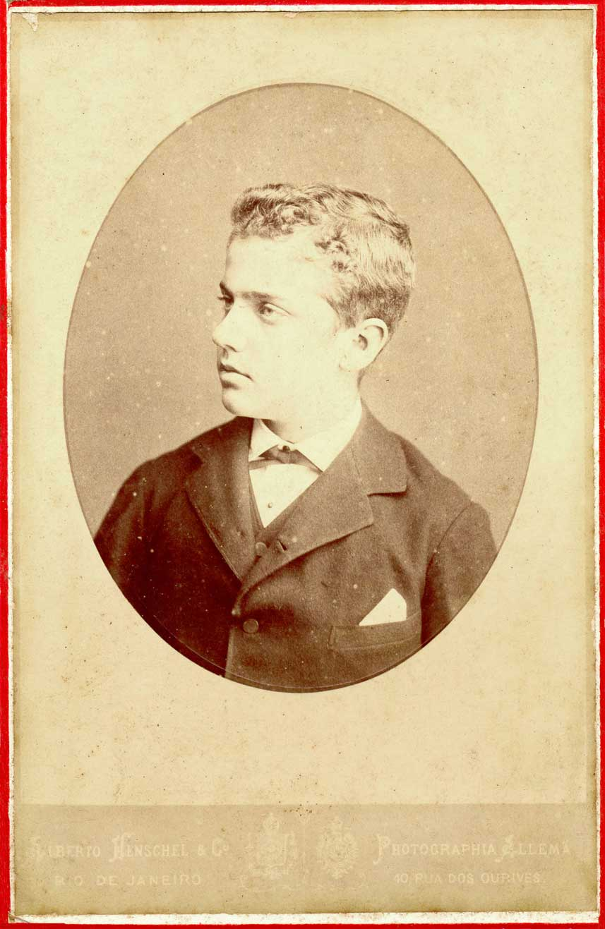 Pedro Augusto, Príncipe de Saxe-Coburgo-Gota (1866-1934)